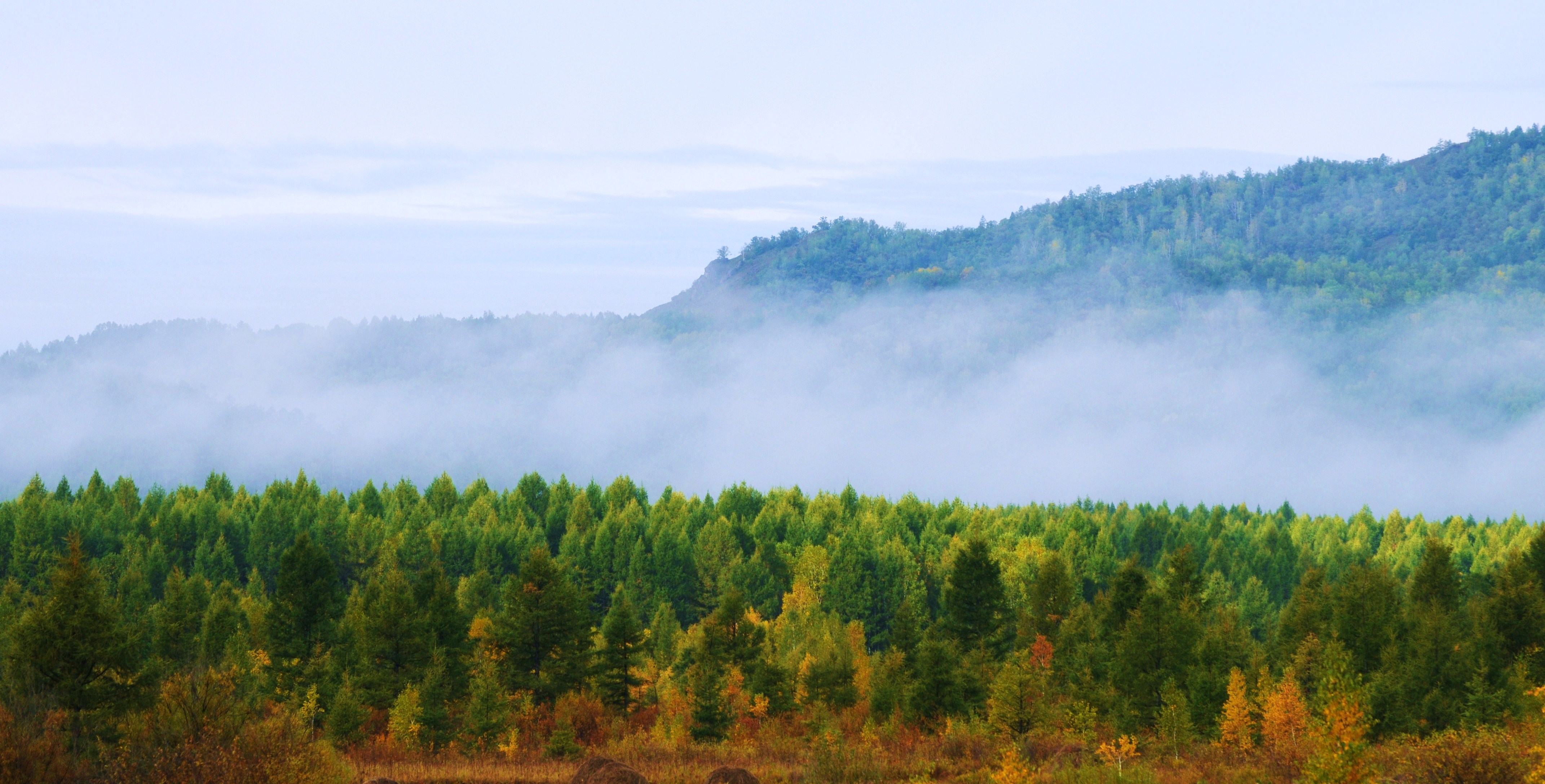 莫尔道嘎 云雾缭绕的大兴安岭